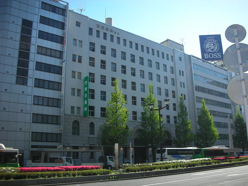 東京建物本社